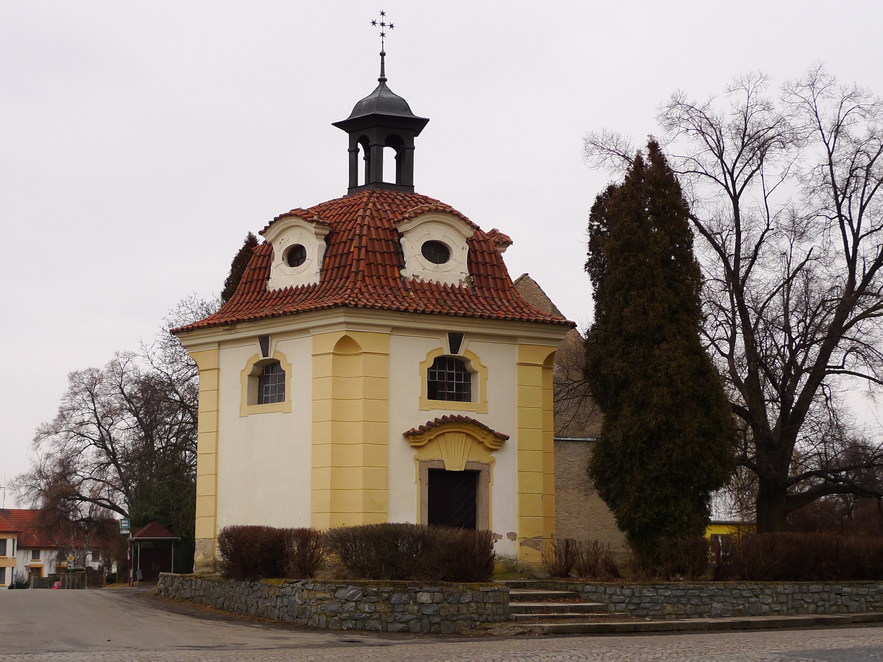 Kaple P. Marie Pomocné (Kouřim), při sil. od Kouřimi do Třebovle, Kouřim